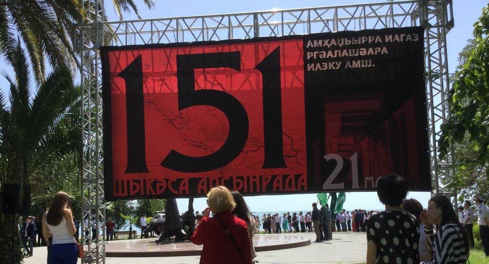 Вывеска о 151 годовщине окончания Кавказской войны в Сухуме (2015 год)